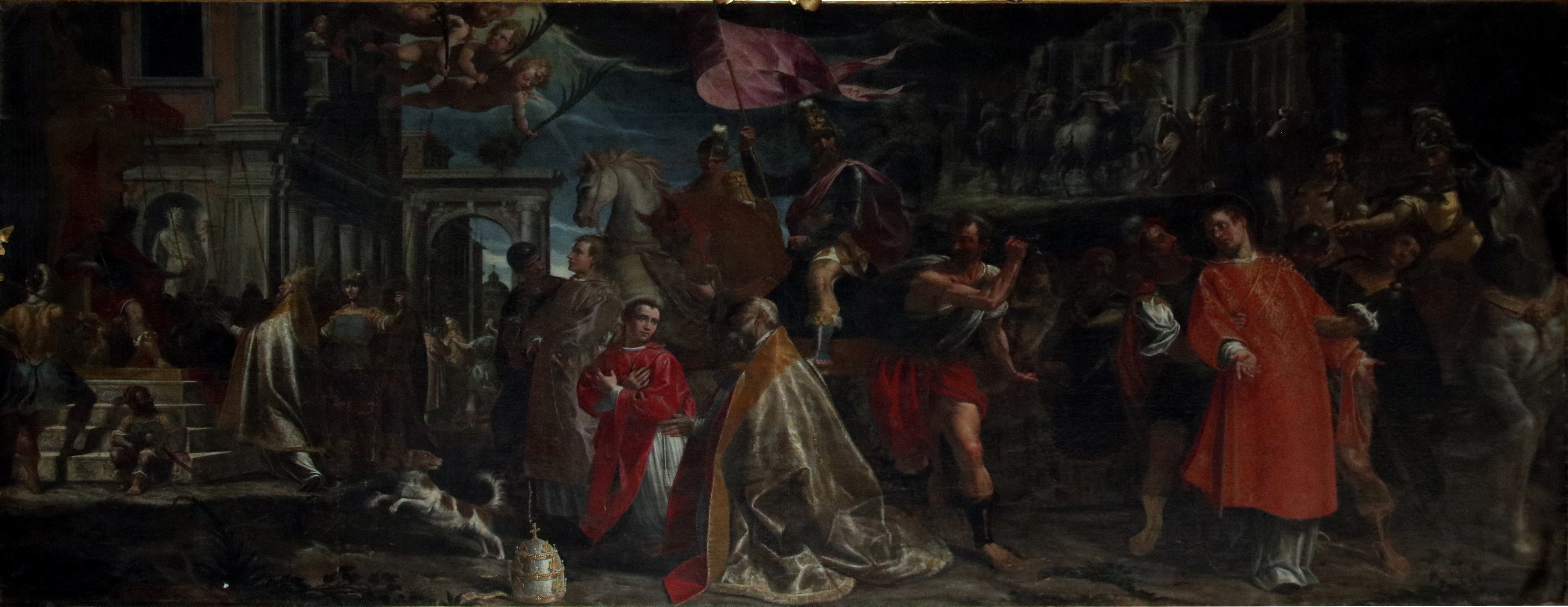 chiesa di San Sisto This is a photo of a monument which is part of cultural heritage of Italy.